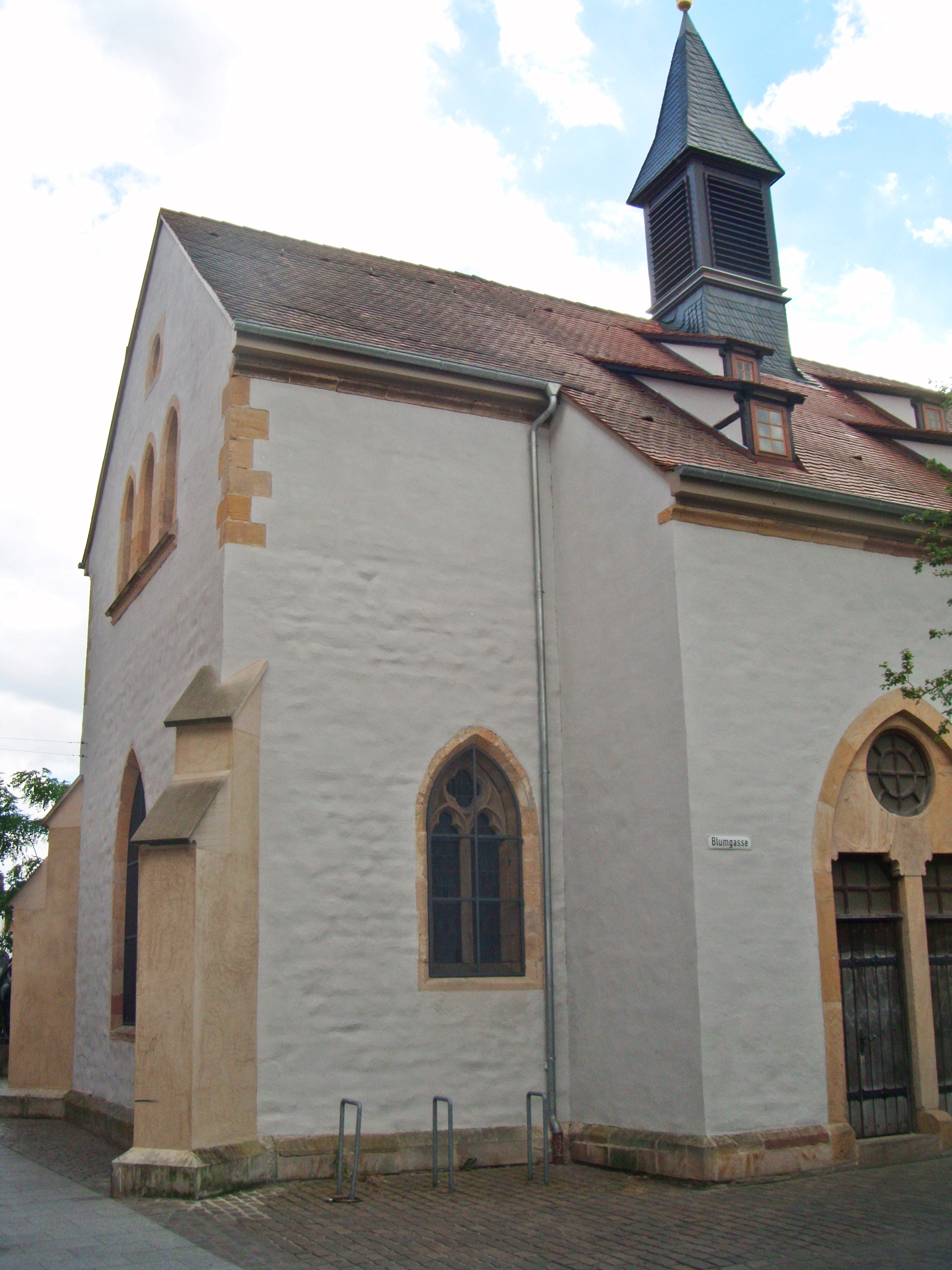 Landau in der Pfalz, Katharinenkapelle von Nord-Osten